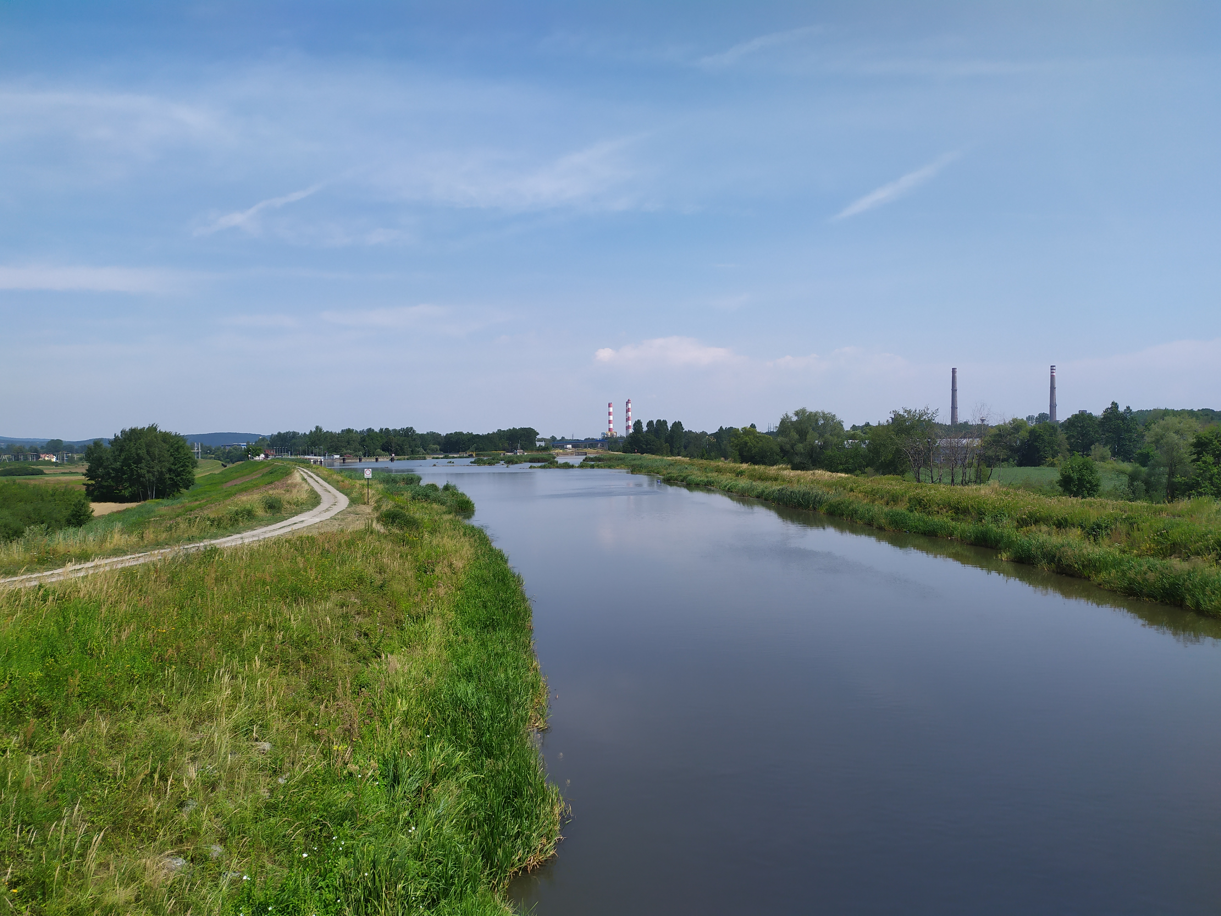 Kanał Łączański w Borku Szlacheckim (2019)